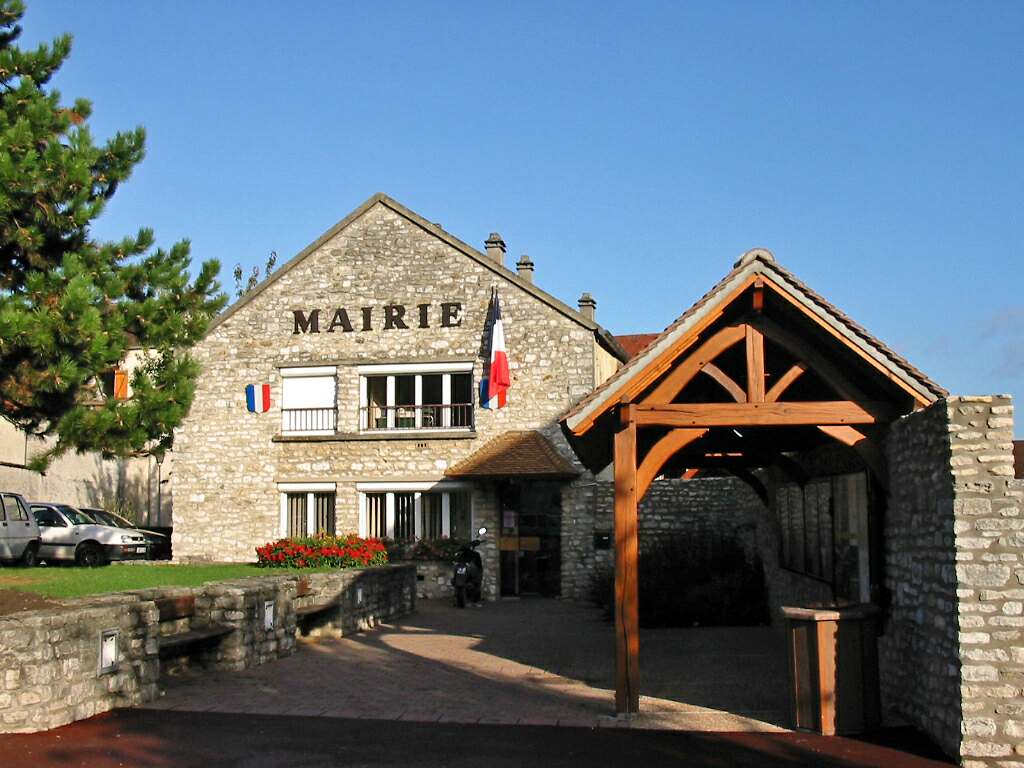 Mairie de Guerville (Yvelines - FRance) Photo JH Mora, novembre 2005